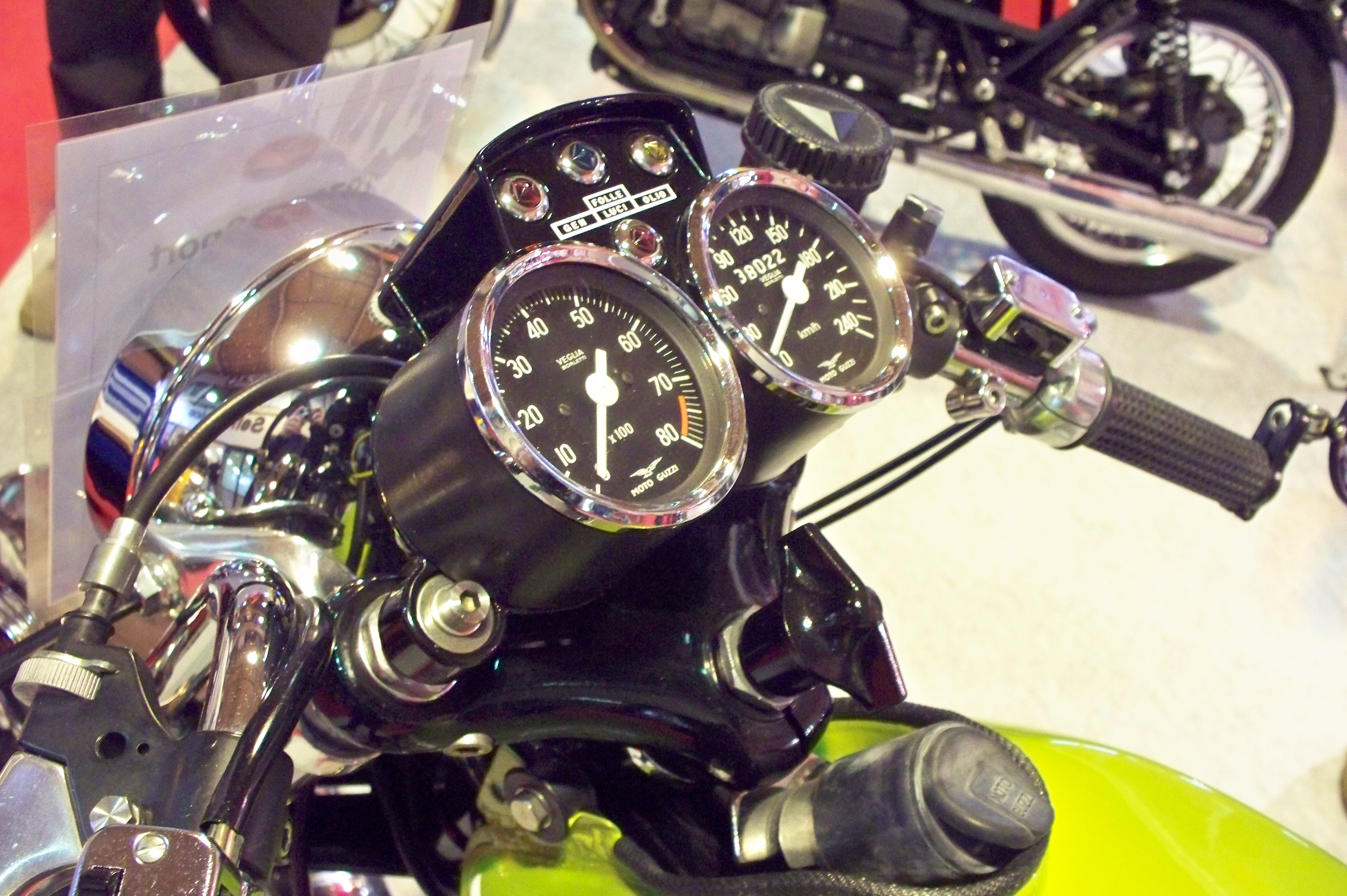 Quadro strumenti della Moto Guzzi V7 Sport del 1972